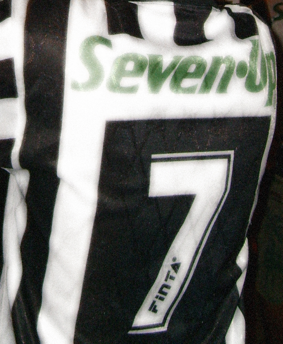 Camisa número 7 do Botafogo de Futebol e Regatas, do ano de 1995, no Maracanã, em 2008.